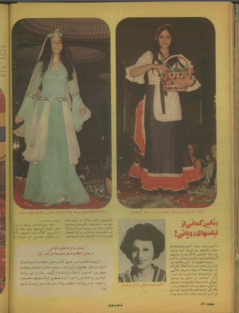 مجله زن روز شماره 536 مرداد 1354